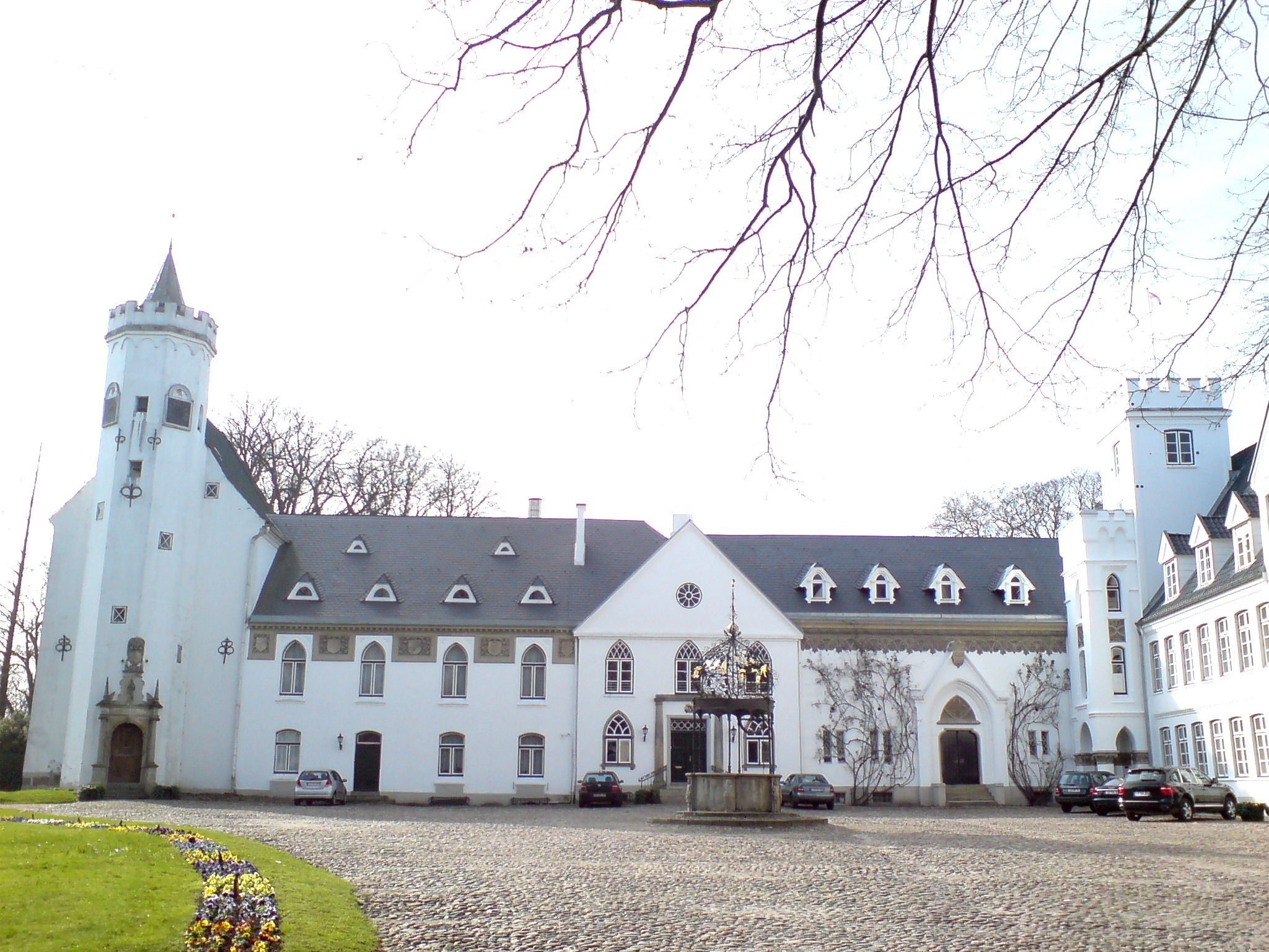 Description=Breitenburg, Westflügel Source=myself Date=03.2008 Author=PodracerHH